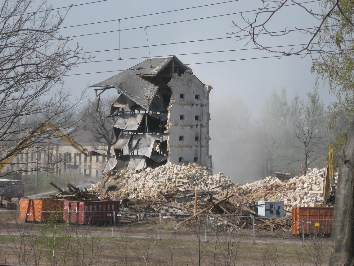 Speichergebäude Heeresbäckerei Albertstadt Dresden: Rest / Abriss, Bild vom 21. Apr. 2008, Blick Richtung Südwest